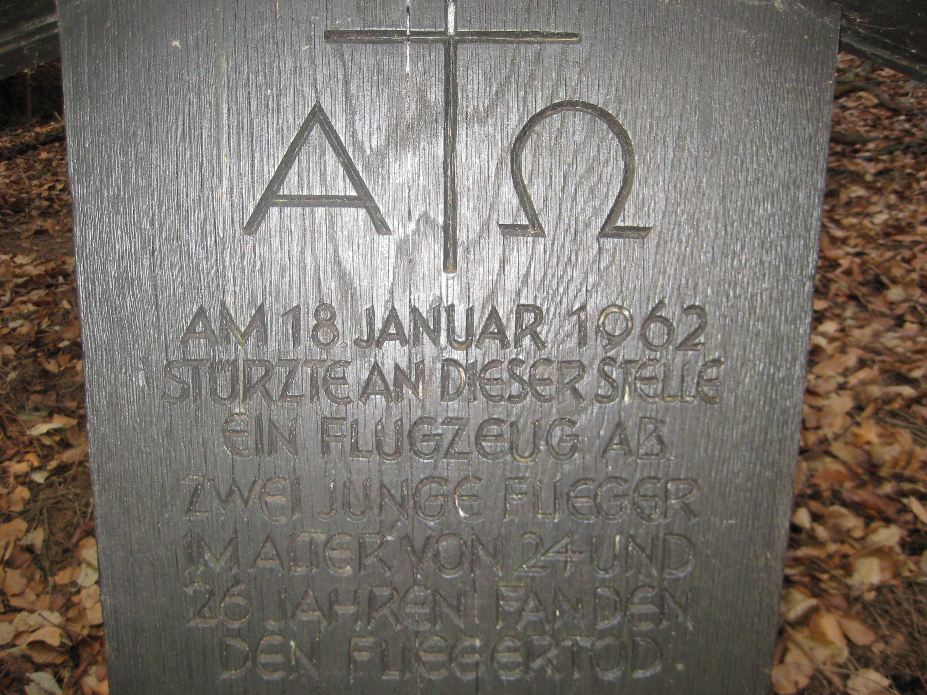 Gedenkstein am Dörenberg in Niedersachsen:Hier stürzte im Januar 1962 ein Flugzeug der britischen Royal Air Force ab; die beiden Insassen kamen ums Leben. On January 28th, 1962, a plane of the British Royal Air Force crashed at mount Dörenberg near Bad Iburg, Lower Saxony, Germany. The two pilots, 24 and 26 years old, died.